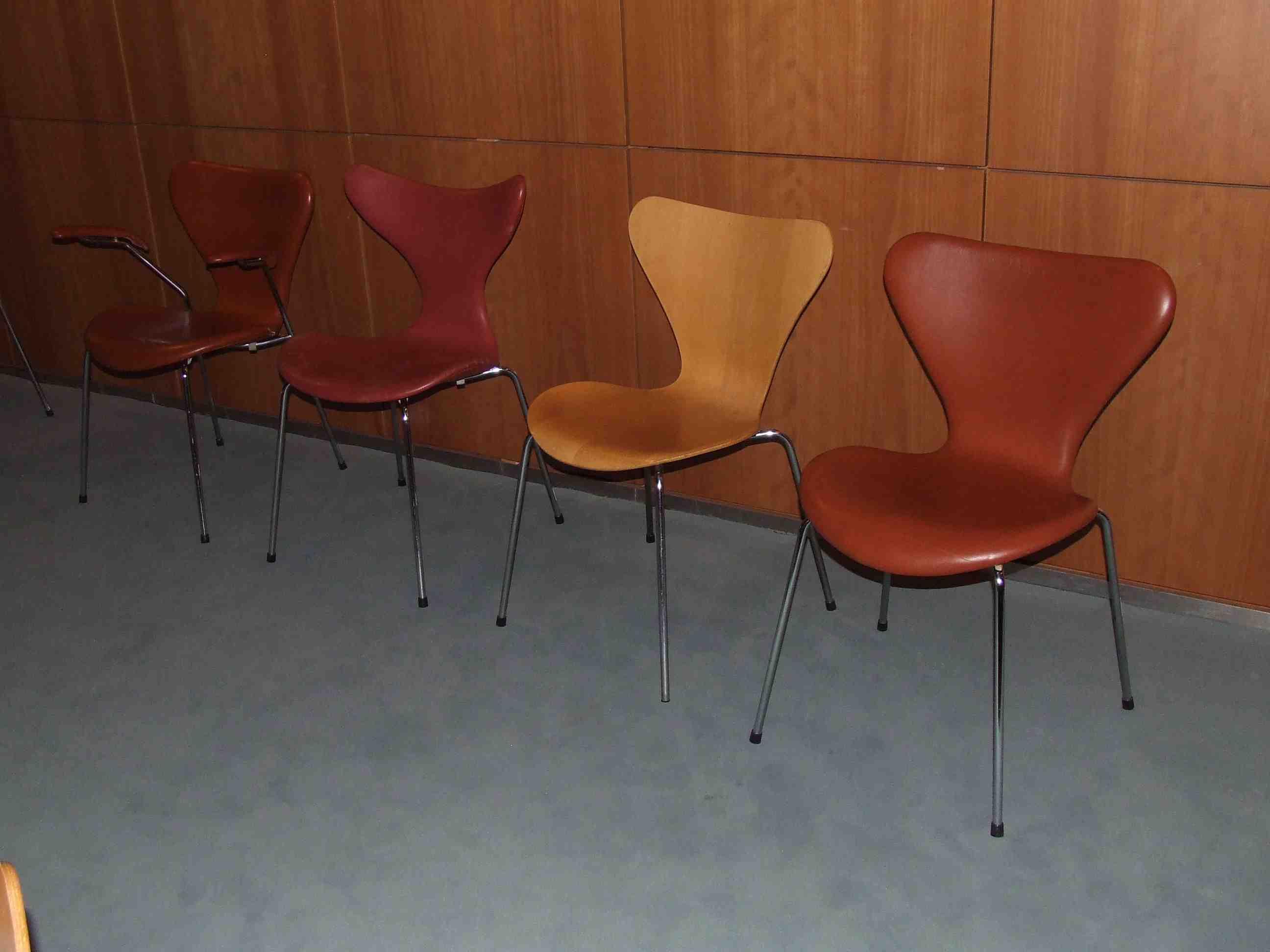 Stühle im Rathaus von Mainz von links nach rechts: Modell 3207 Leder mit Armlehne (Valencia und Erfurter Zimmer) - Fritz Hansen Made in Denmark 1990 Modell 3108 Leder Typ "Möwe" (Empfangsraum und Louisville-Zimmer) Modell 3107 Holz (Kantinenbereich und Lager) Modell 3107 Leder (Valencia und Erfurter Zimmer)